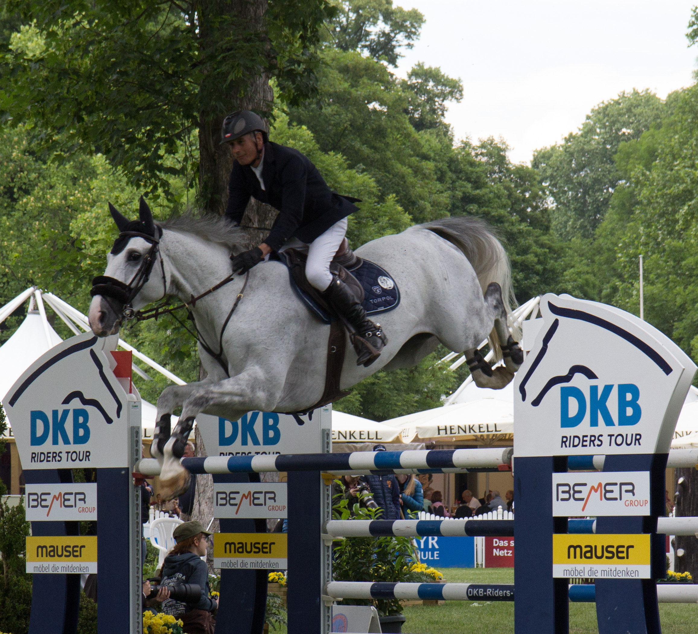 Walter Gabathuler auf Silver Surfer